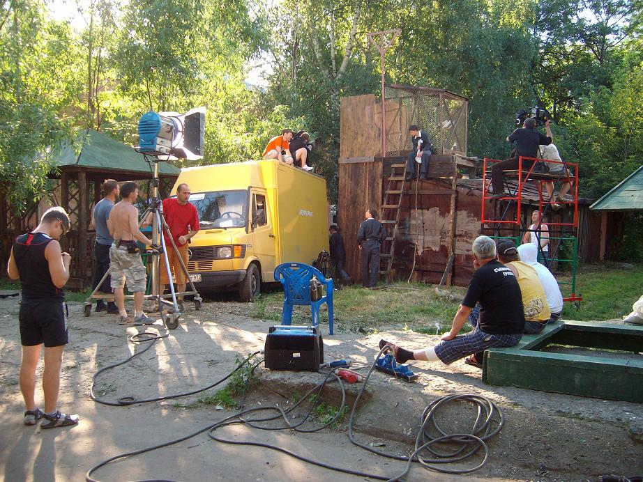 На съемках кинофильма З. Ройзмана "У каждого своя война" (Ярославль, 2010).